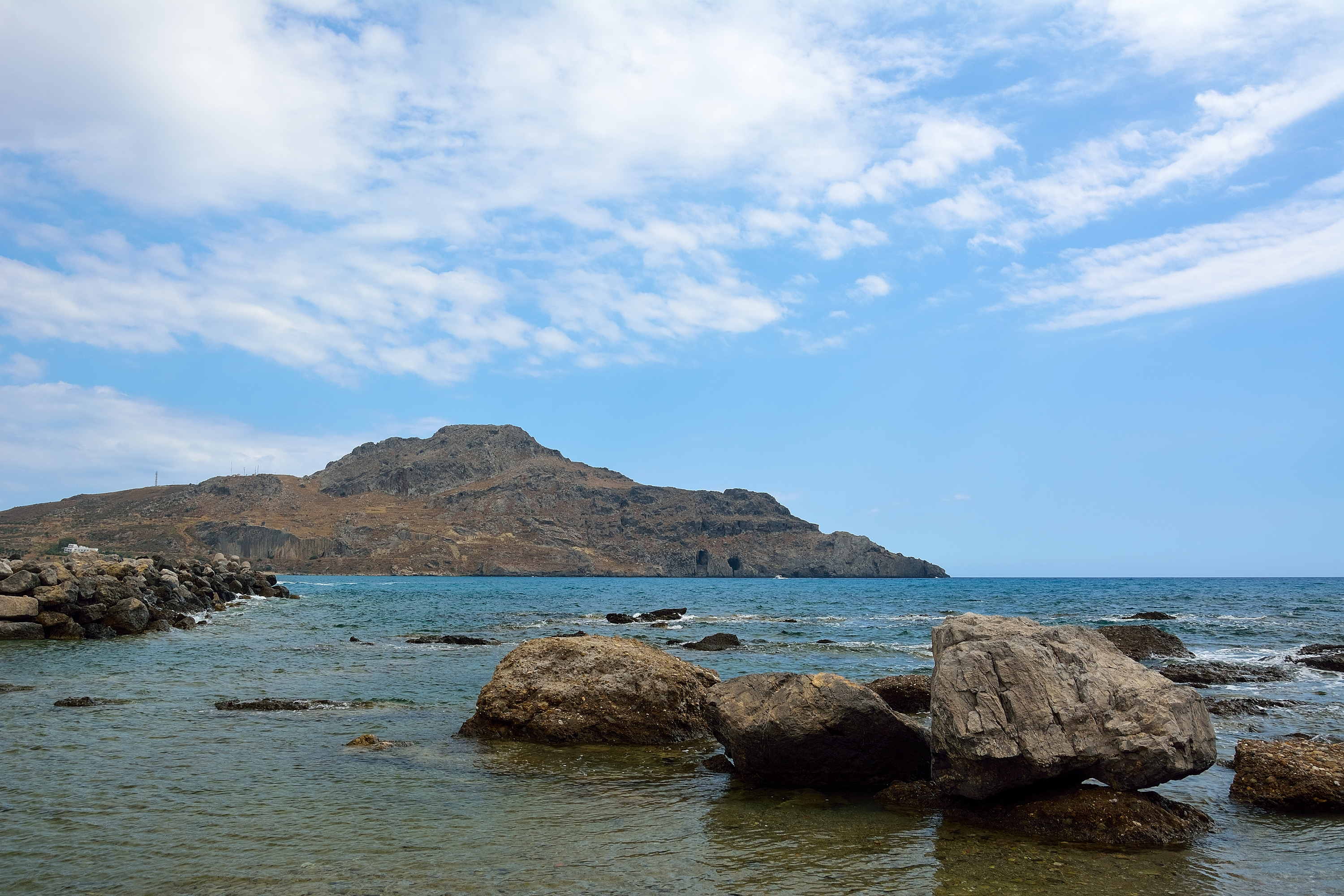 Побережье Ливийского моря (деревня Плакиас, о.Крит)